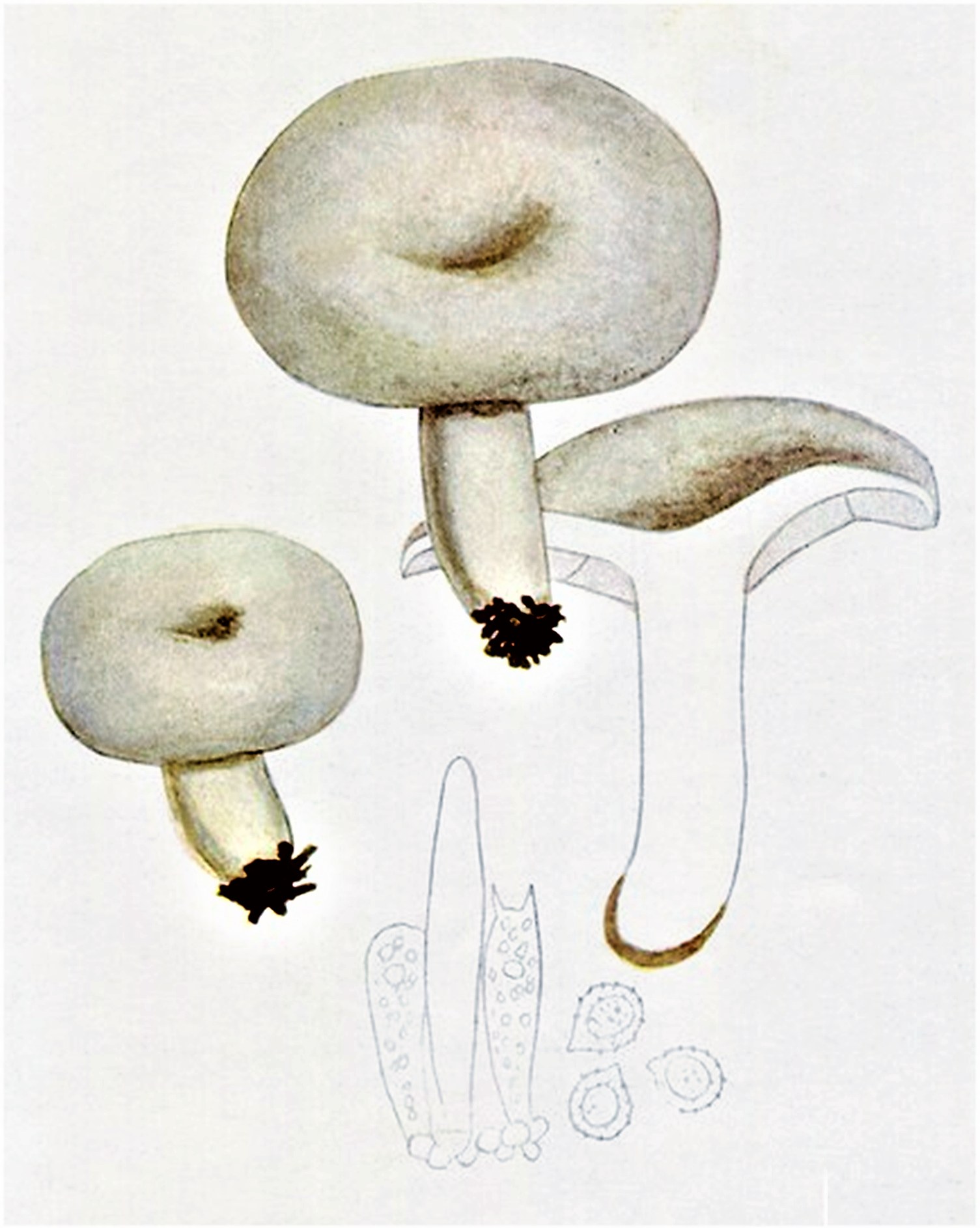 Giacomo Bresadola: Lactarius pubescens Fr. (1838)